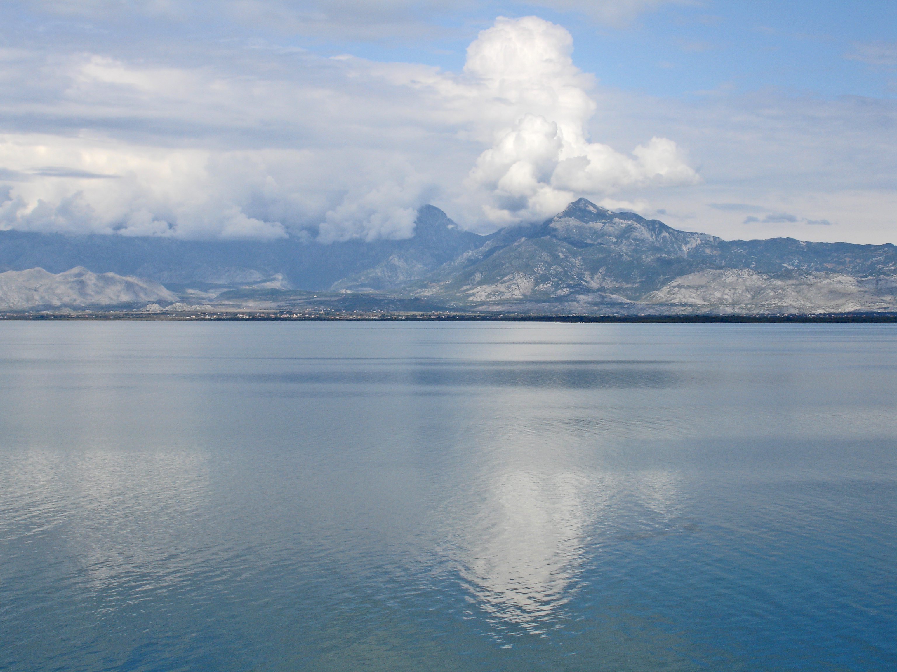 Lac de Shkodra et le mont Maranaj (1576 m) en Albanie